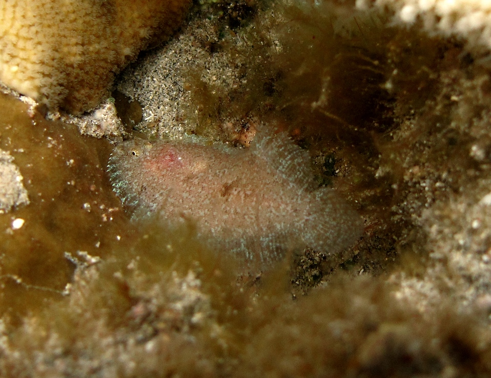 Le poisson plat Aseraggodes diringeri à la Réunion.